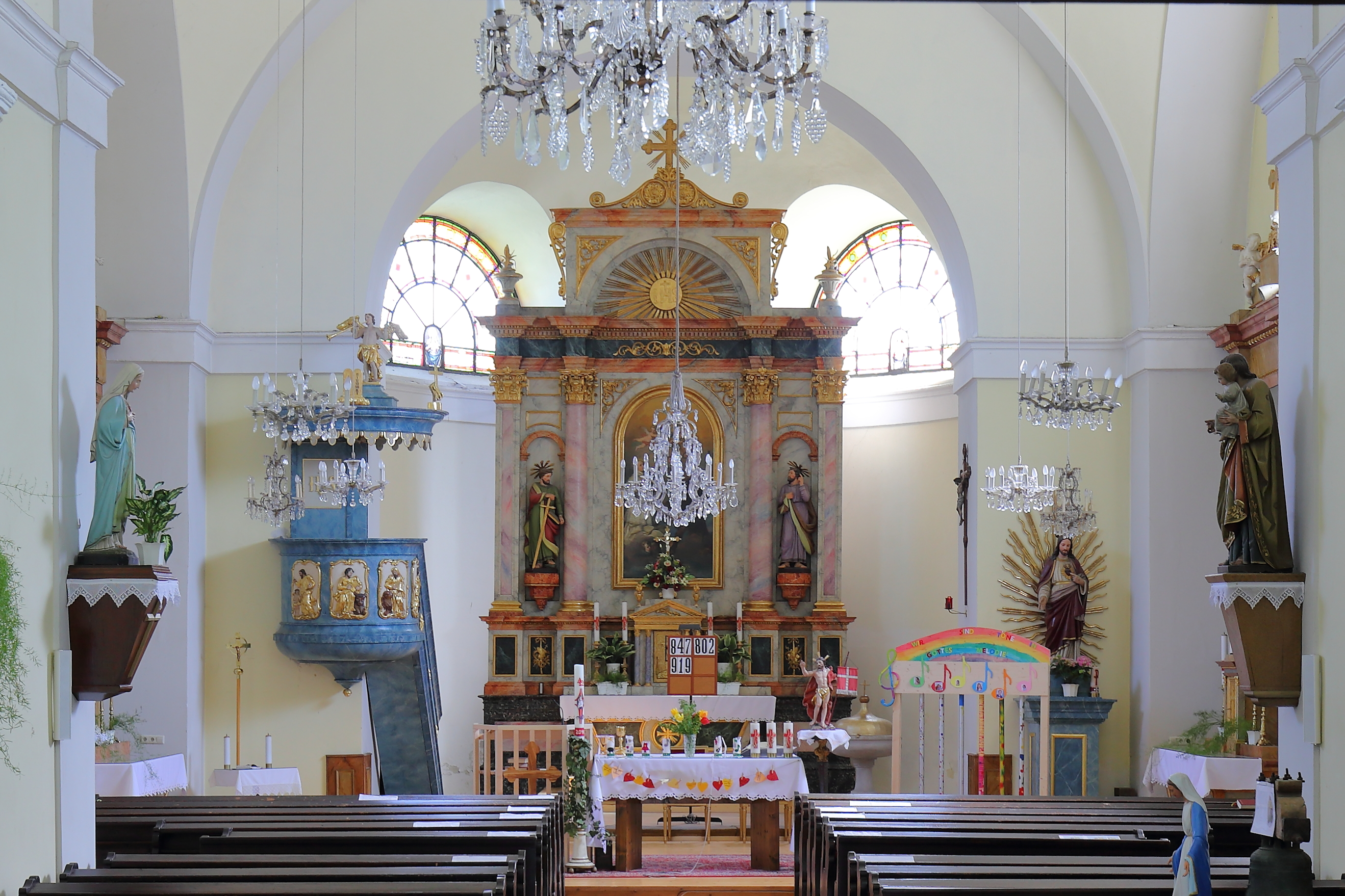 Innenansicht Richtung Hochalter der römisch-katholischen Pfarrkirche hl. Koloman in der niederösterreichischen Marktgemeinde Ebenthal.Von 1831 bis 1840 wurde die Kirche umgebaut und erweitert. Aus dieser Zeit stammt auch vorwiegend die Einrichtung.